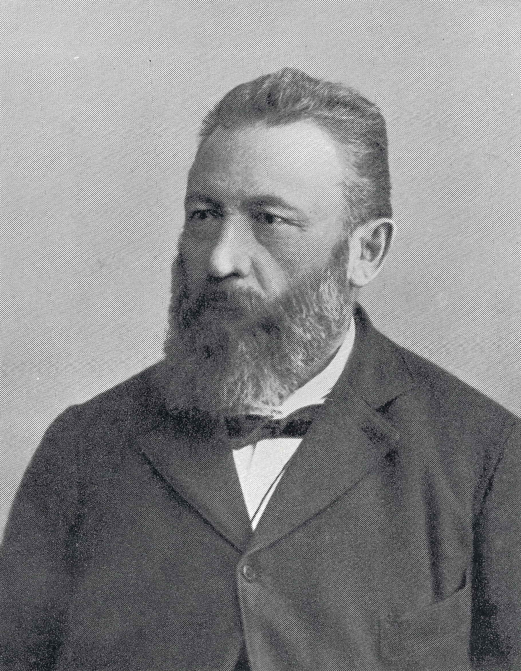 Georg Fient (1845–1915), Bündner Journalist, Regierungssekretär und Kanzleidirektor sowie Mundartautor